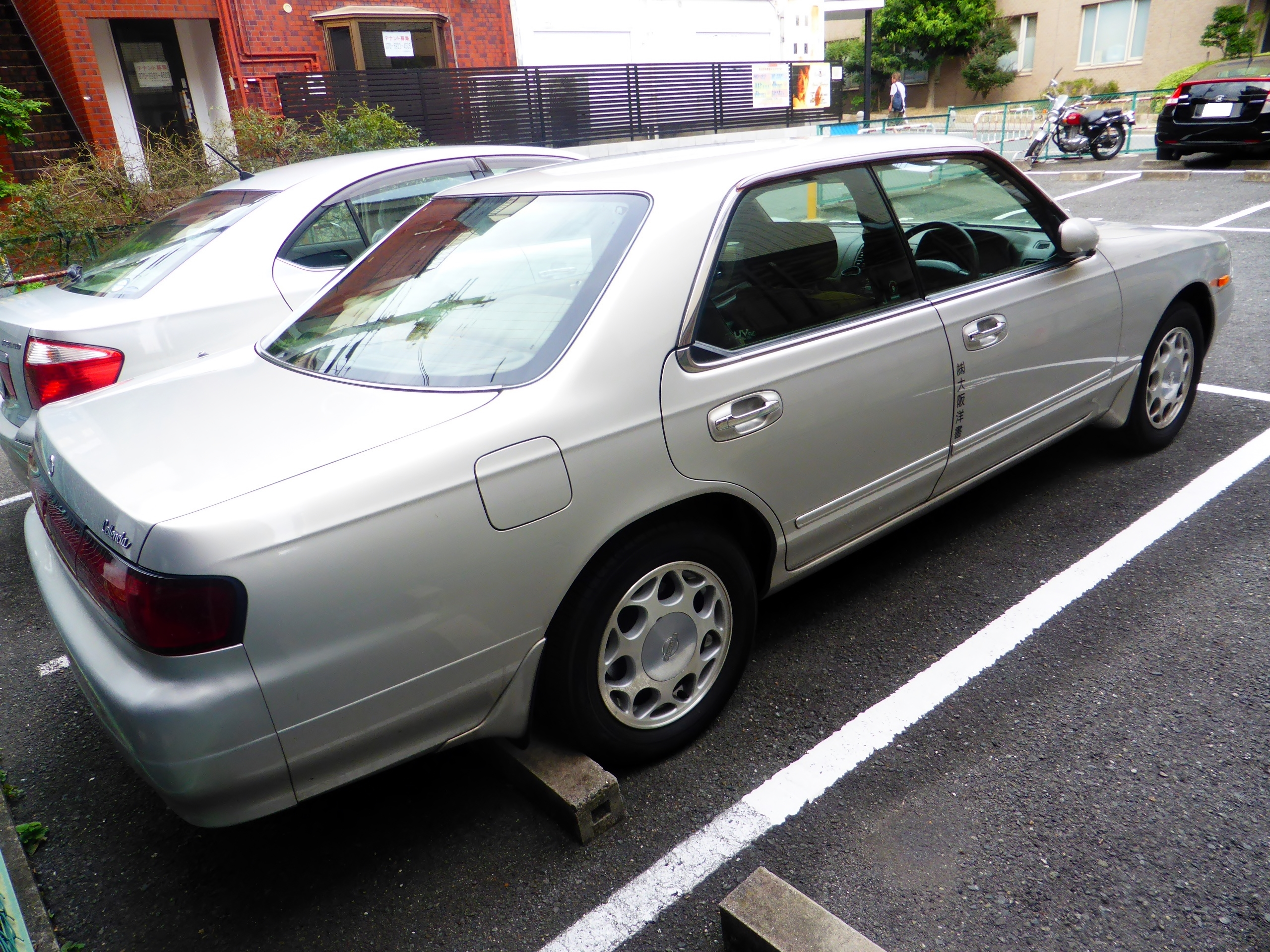 C34型日産・ローレルセレンシアをリアから撮影。